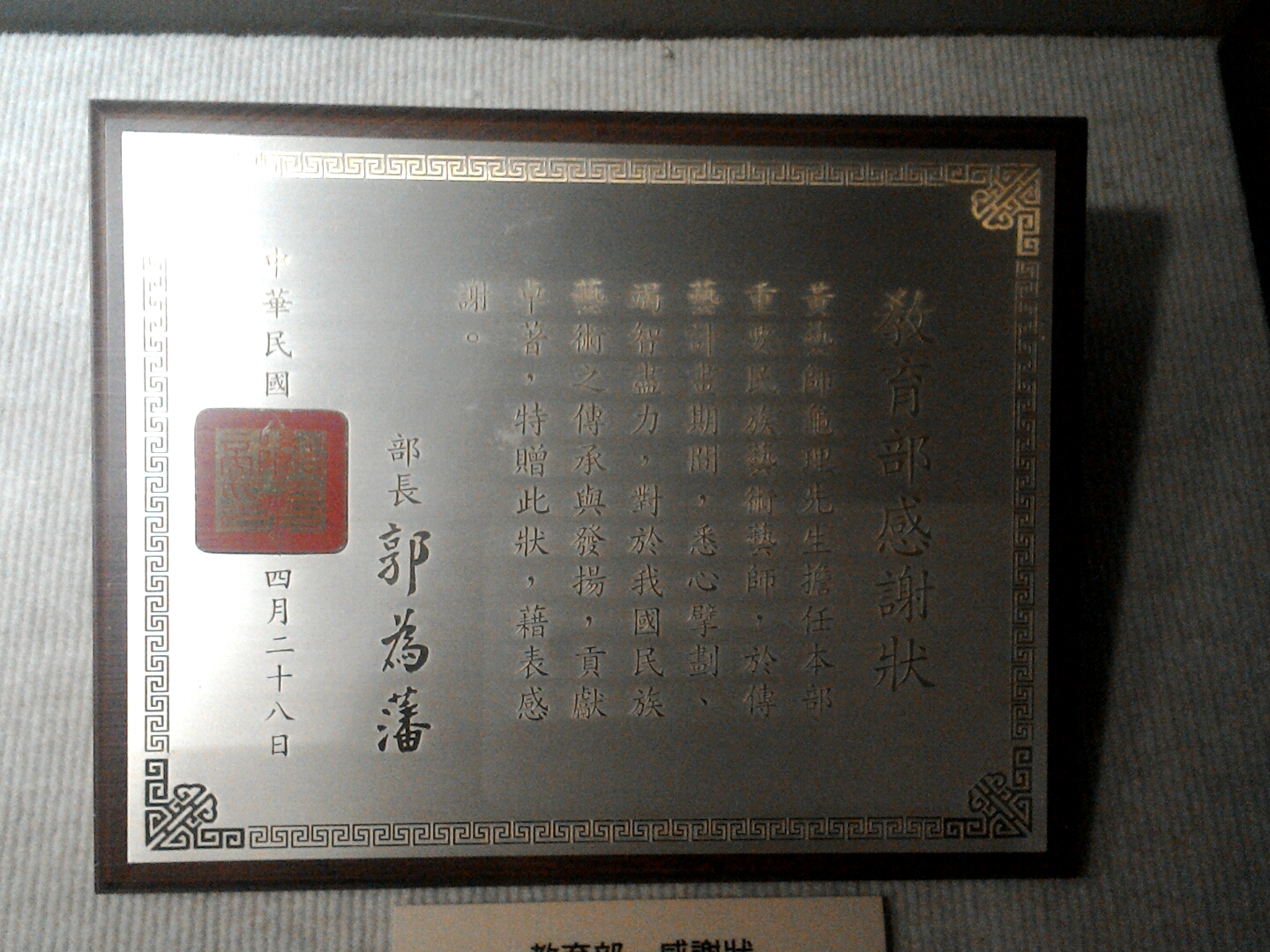 教育部部長郭為藩頒予黃龜理的感謝狀,新北市板橋區第二區忠翠里